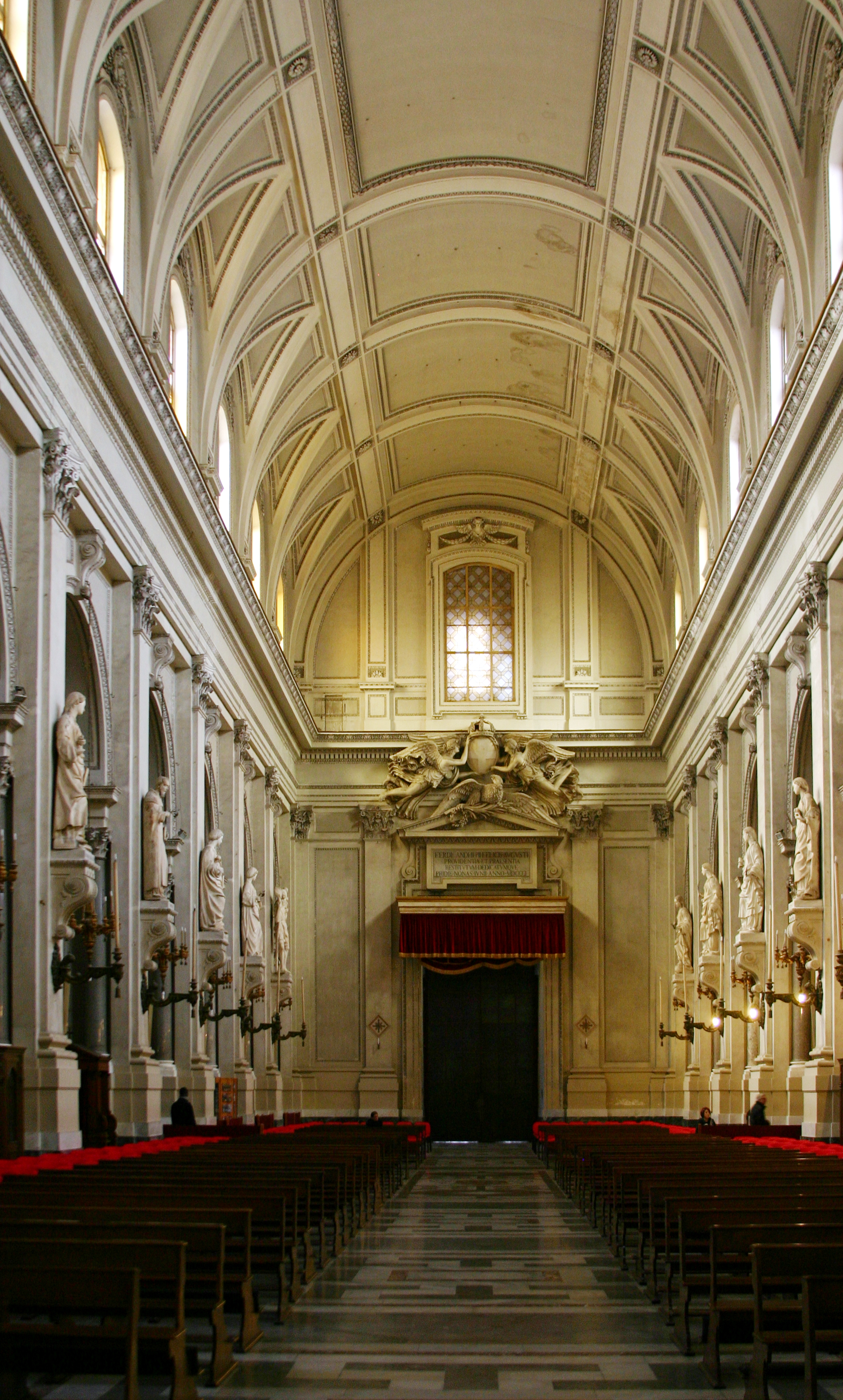 Cathedral of Palermo